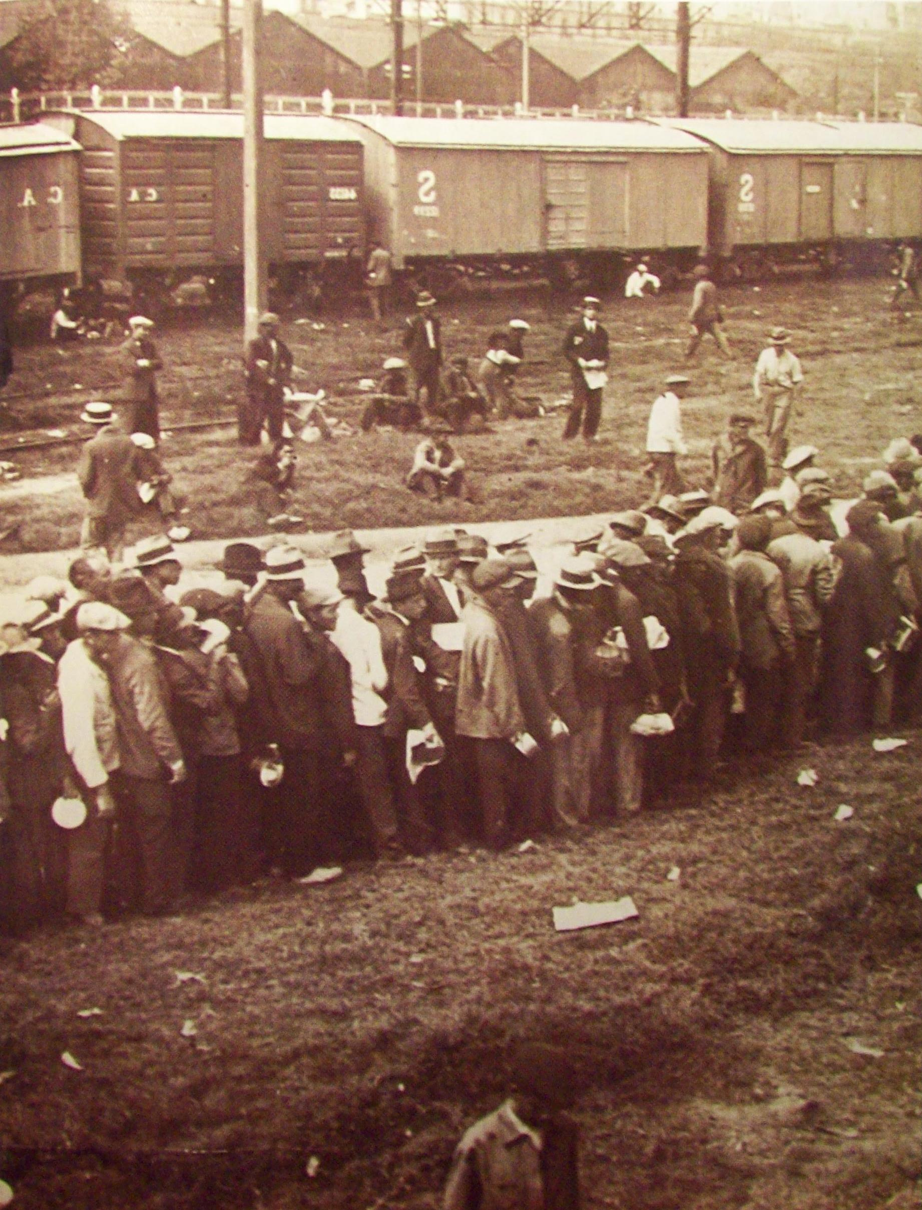 Deitsch: Grupo de trabajadores en una de las primeras villas de emergencia de la ciudad de Buenos Aires.